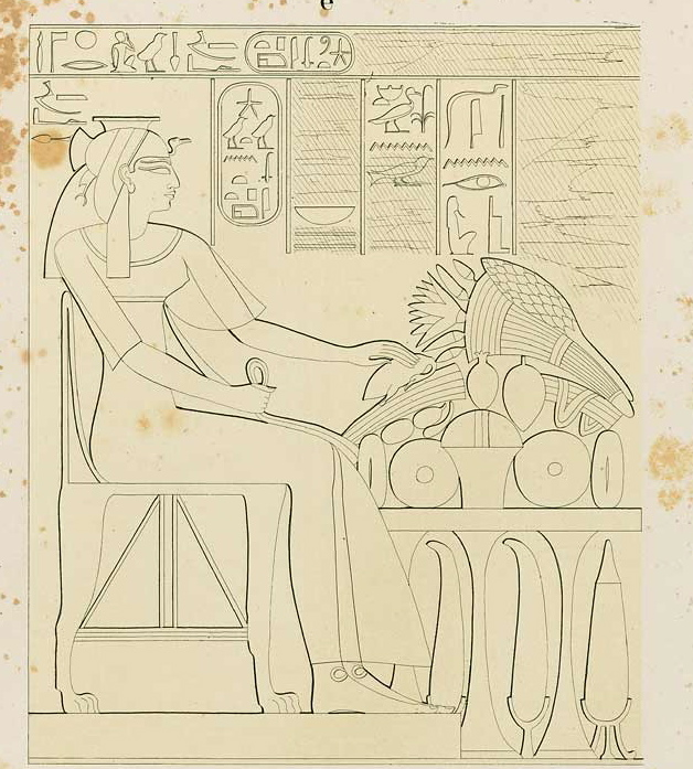 Duatentopet